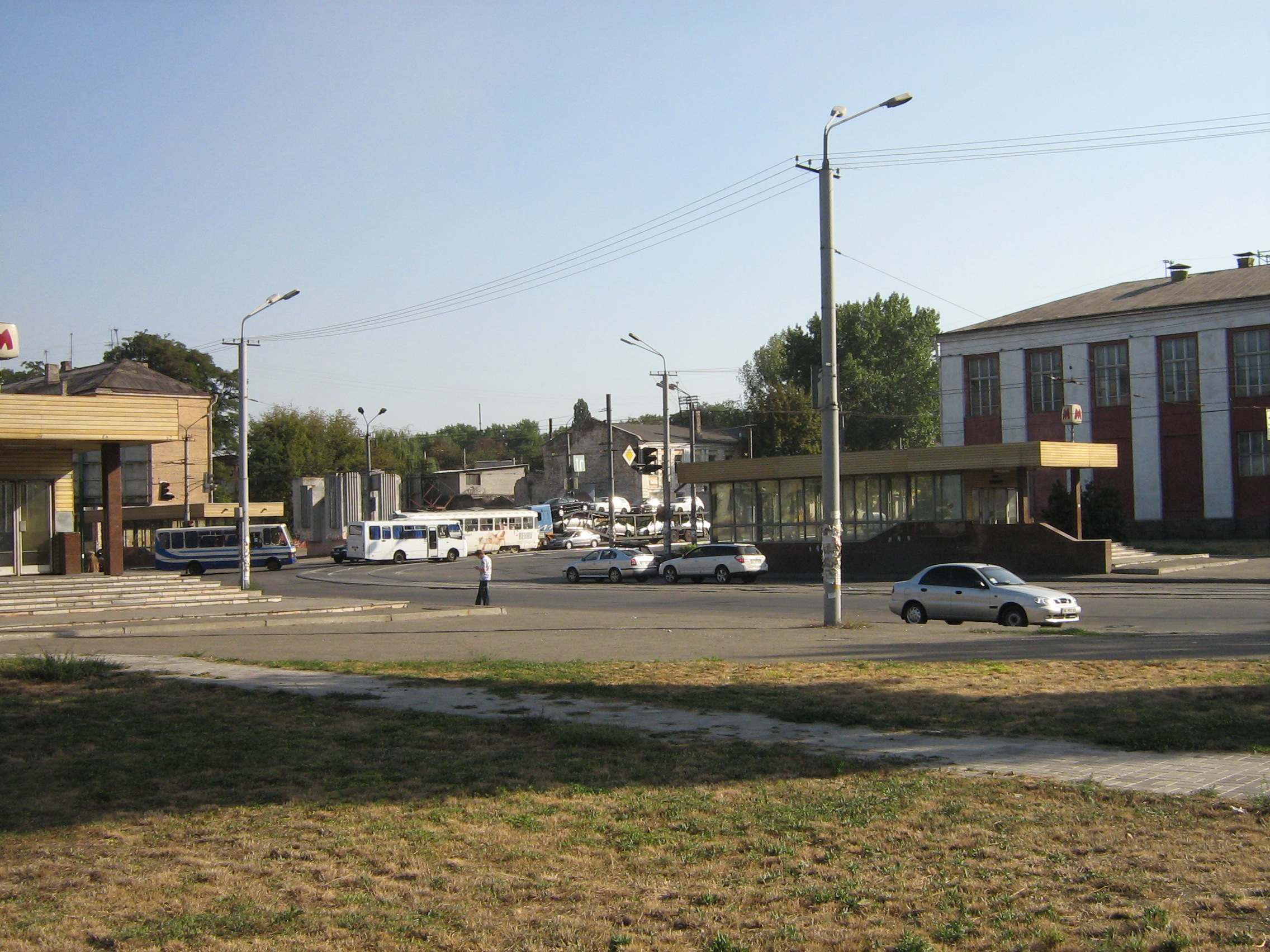 Виходи станції Метробудівників (Дніпропетровськ). Три виходи станції на перетині вул. Калініна та пр. Петровського